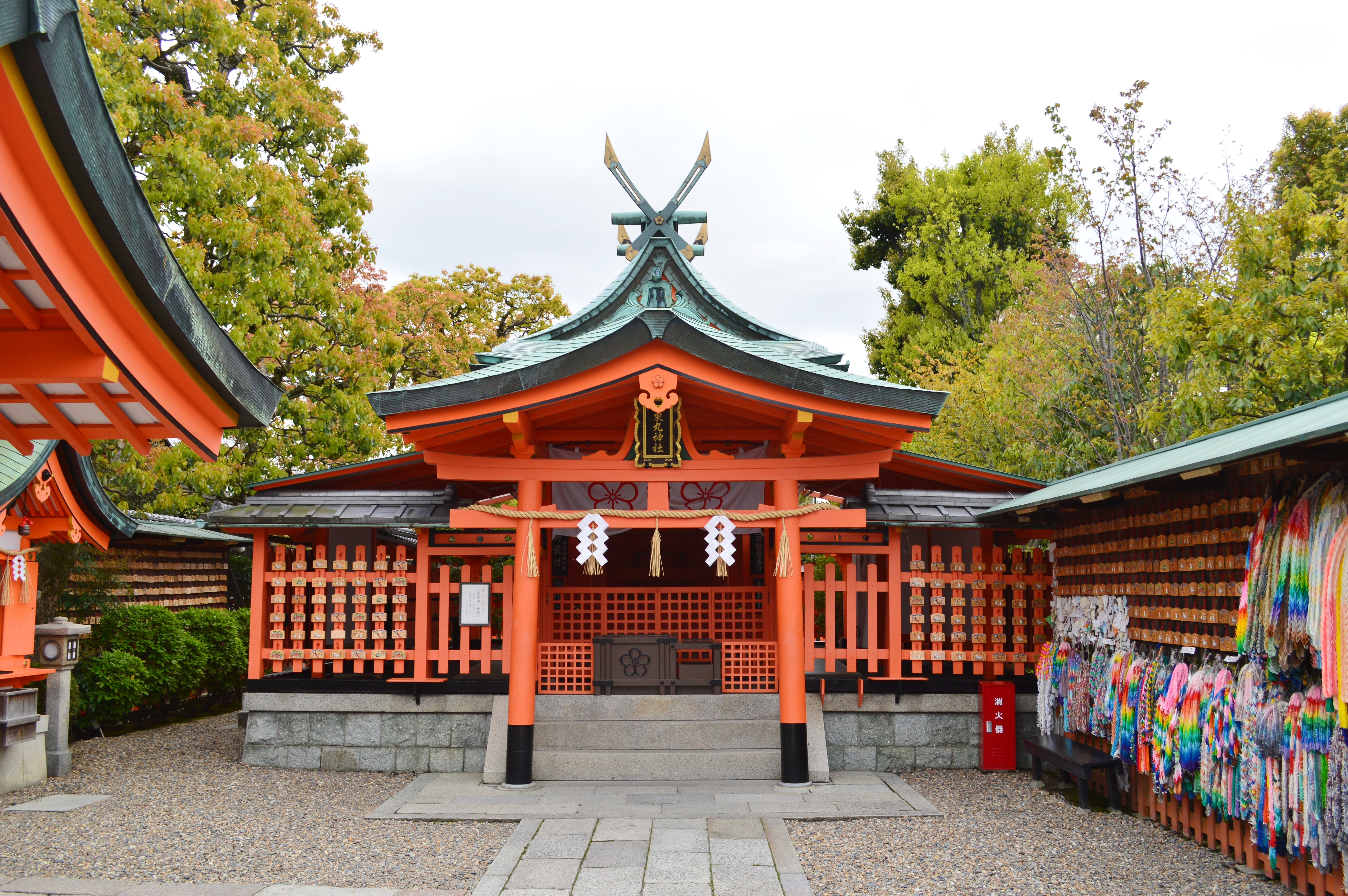 東丸神社 本殿 Nikon D3200